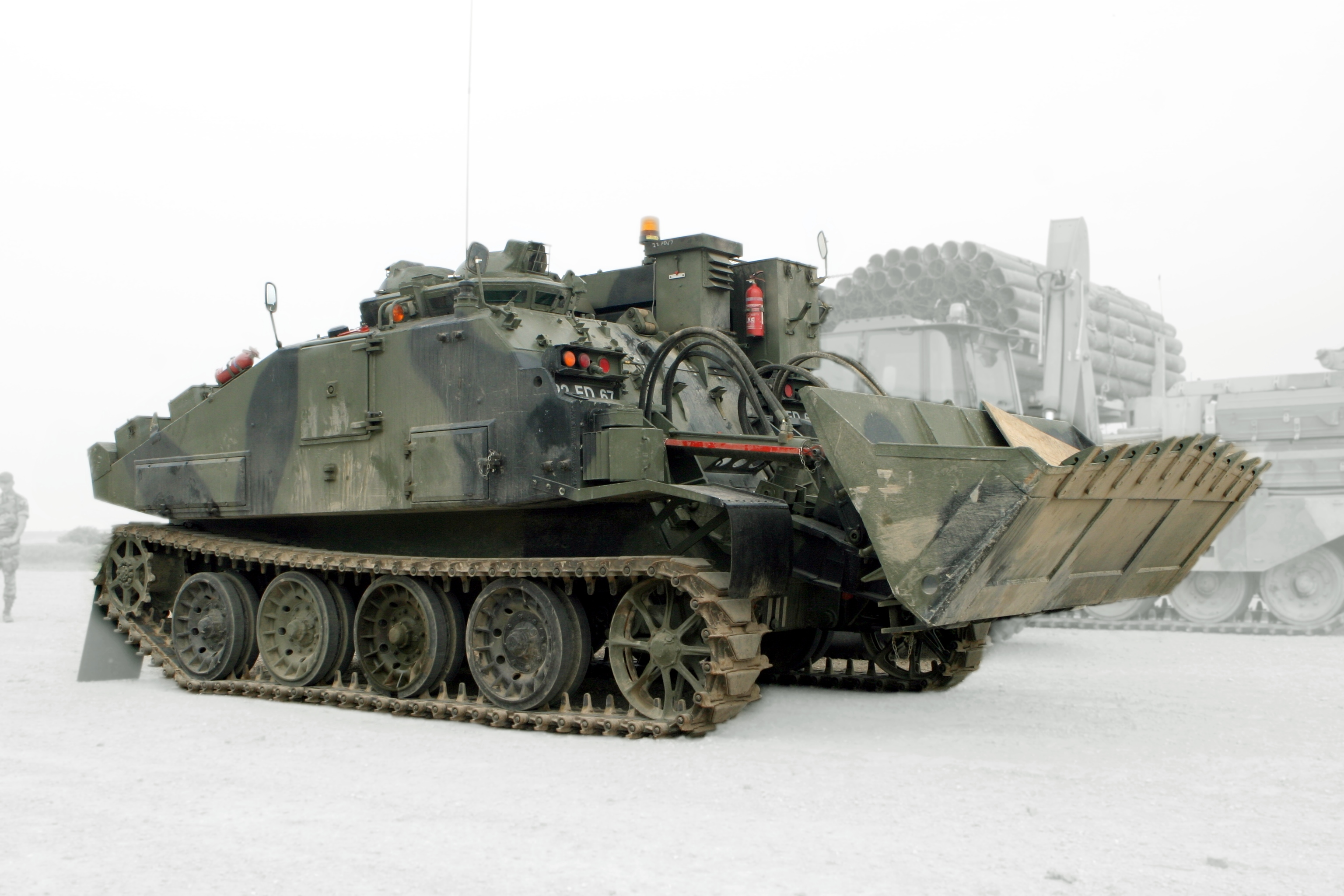 photo du Combat Engineer tractor britannique